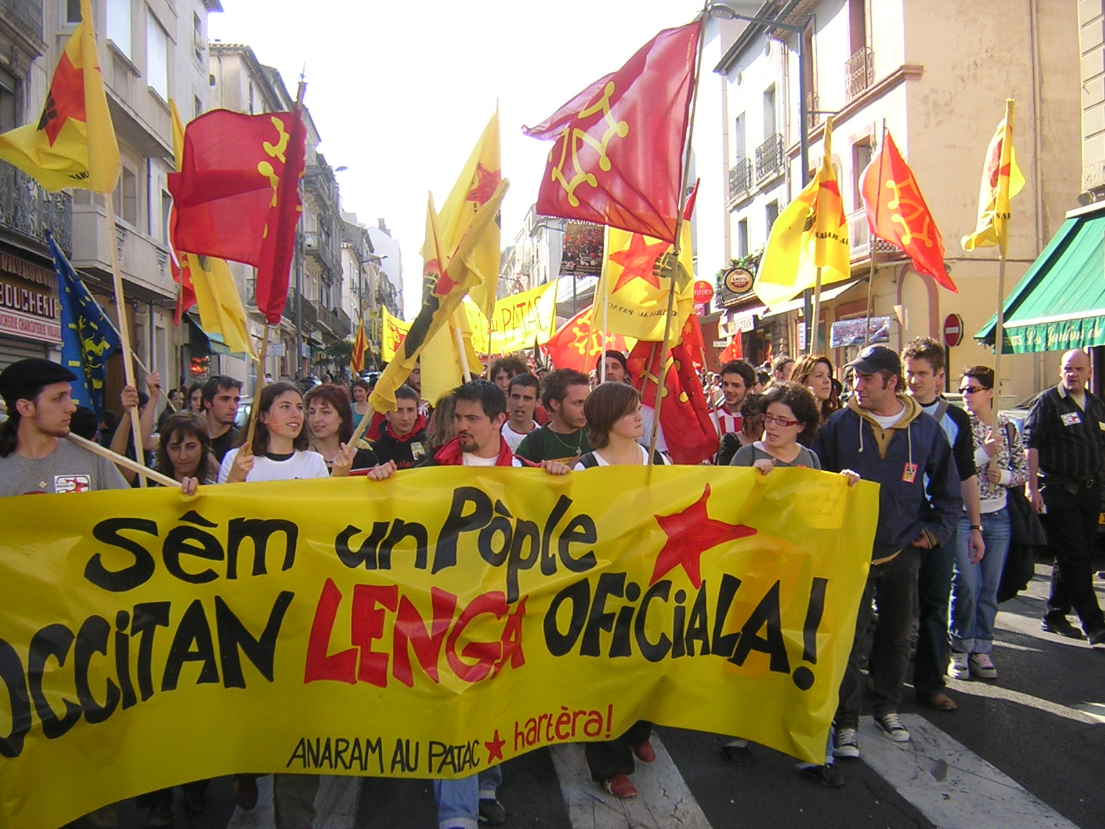 Cortègi d'Anaram Au Patac a la manifestacion de Besièrs.